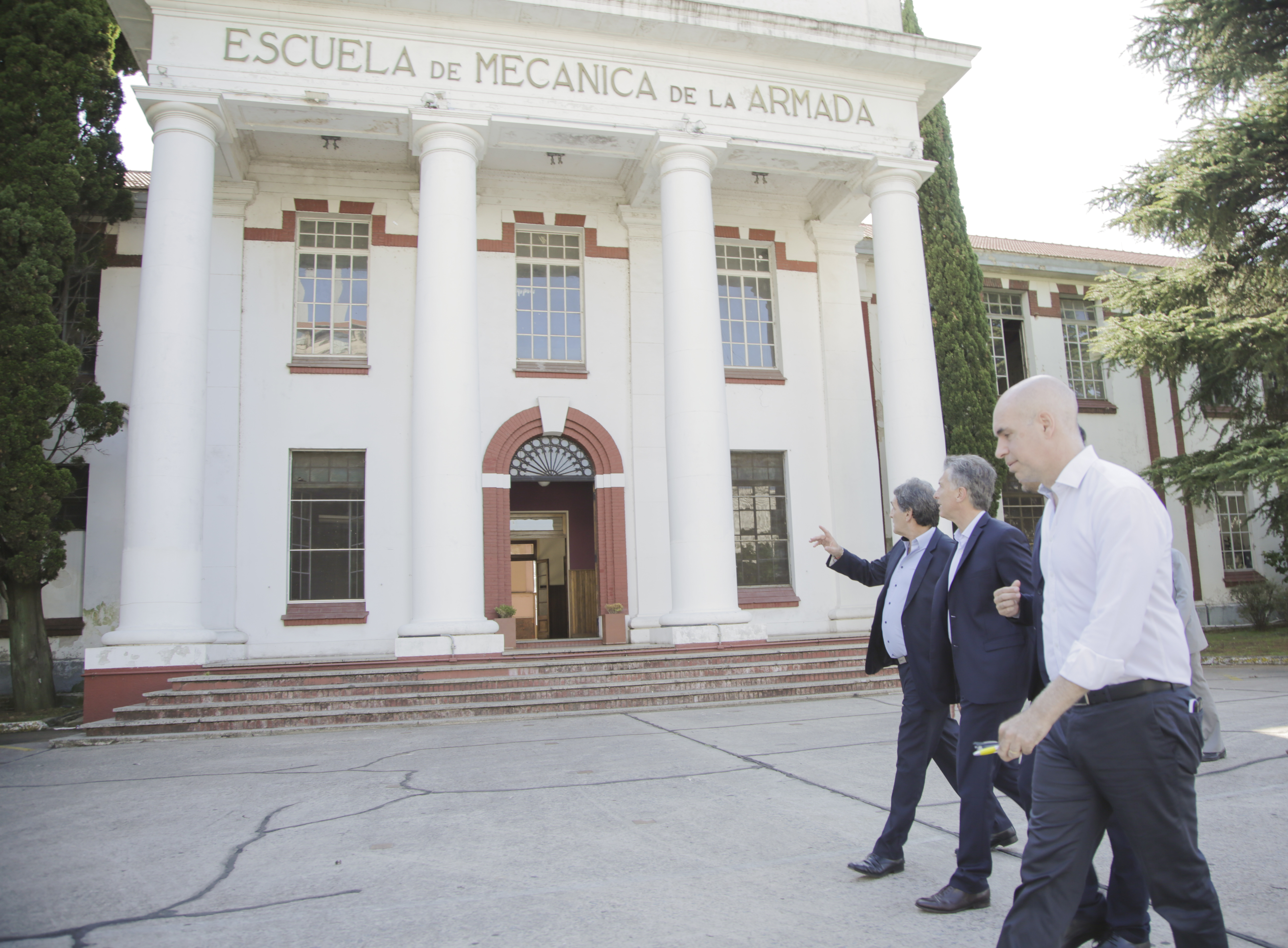 Mauricio Macri visita el Espacio Memoria y Derechos Humanos (ex Esma) junto a Horacio Rodriguez Larreta, Germán Garavano y Claudio Avruj